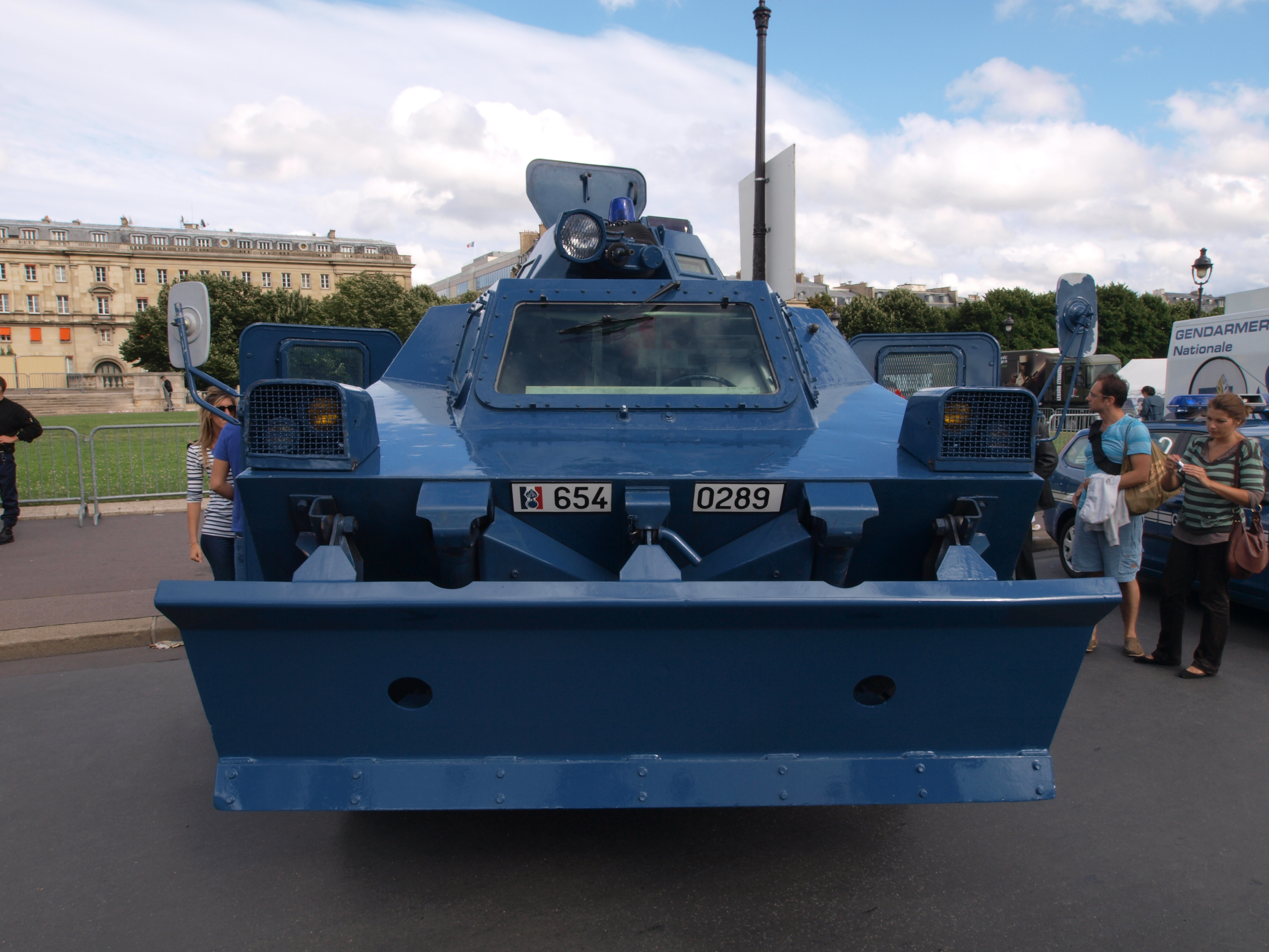 VBRG, vehicule blindé a roues de la gendarmerie